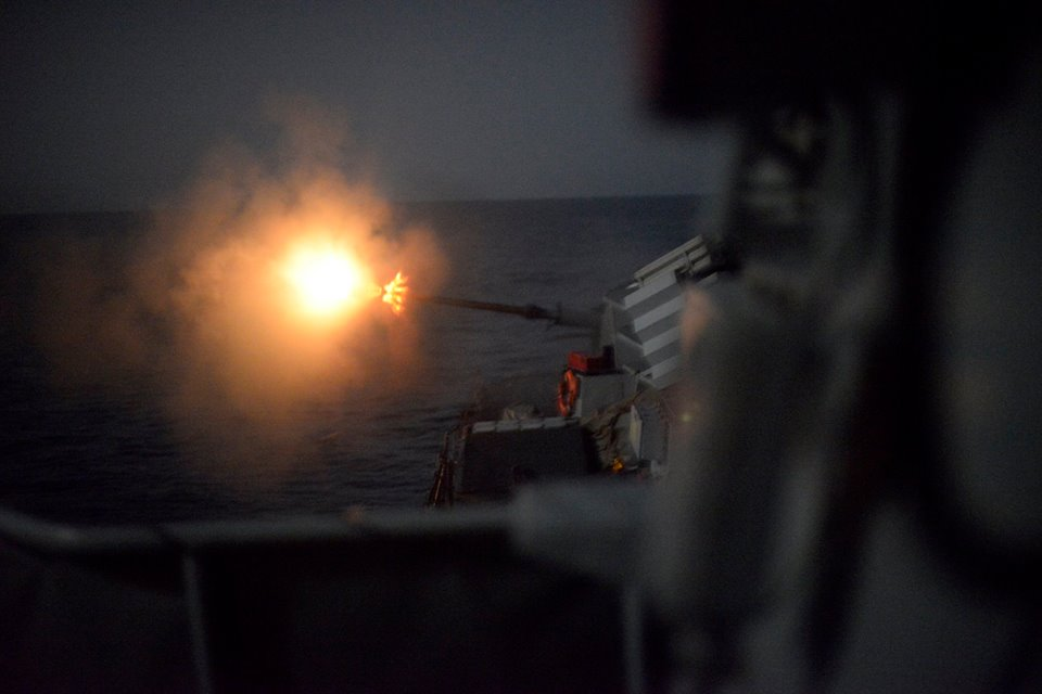 אח"י יפו בצוק איתן